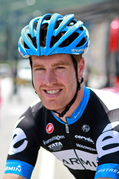 Etape 1 (Albertville) du Critérium du Dauphiné 2011